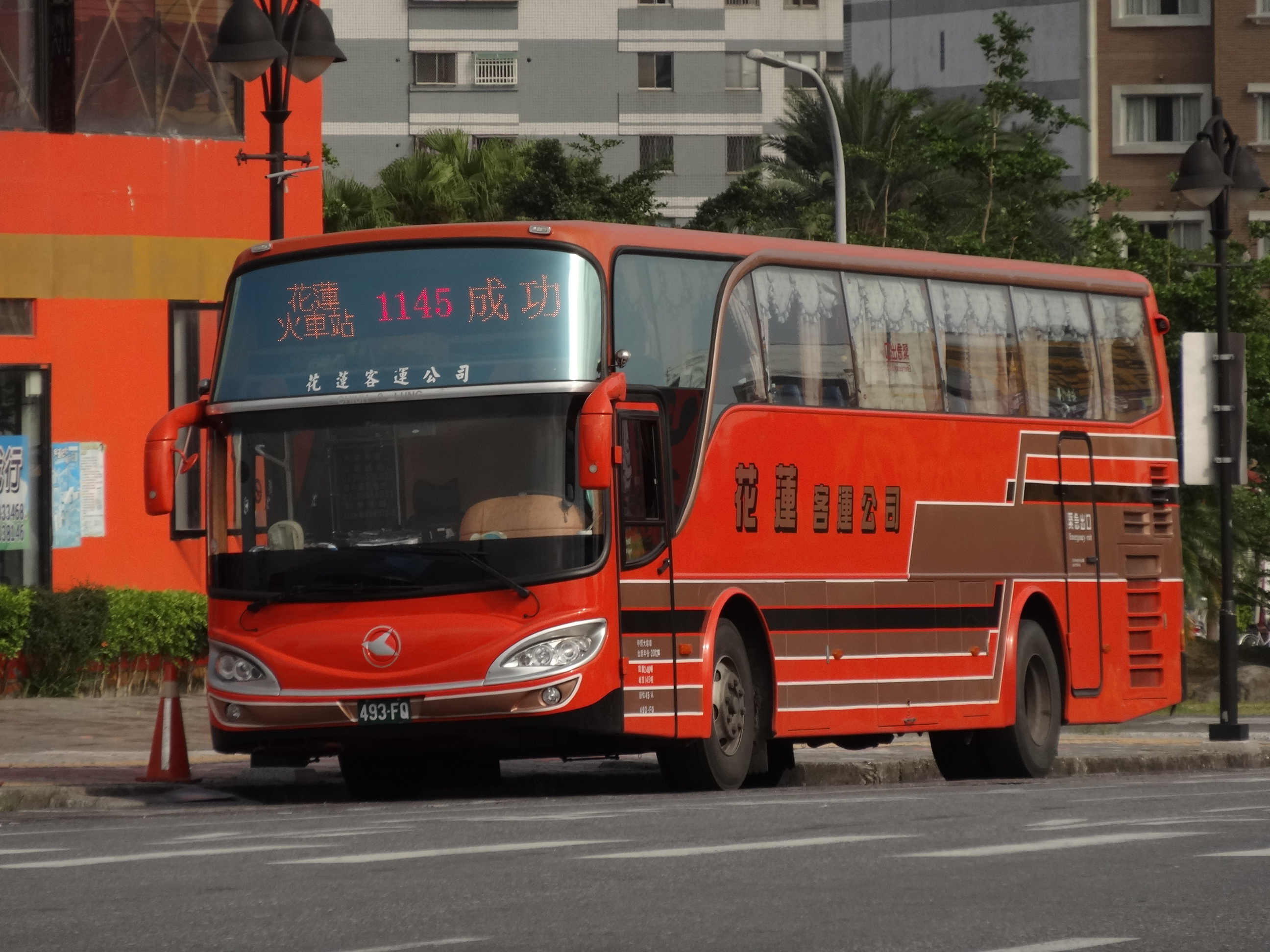 花蓮客運493-FQ 1145花蓮→成功